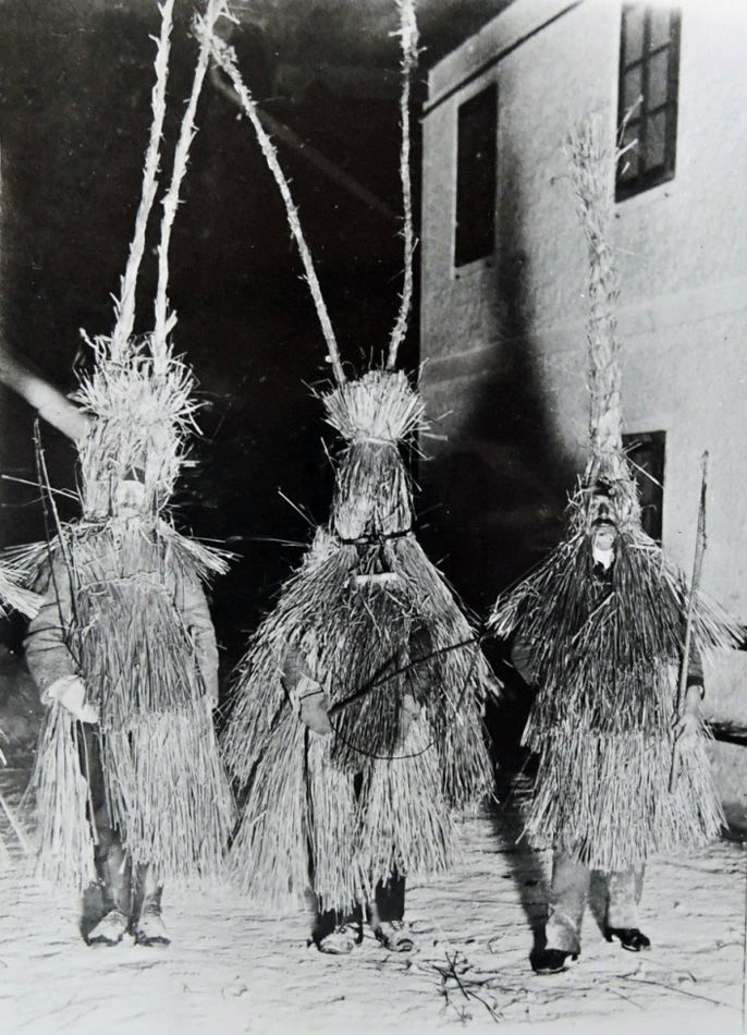 Drei (Stroh-)Schab aus dem Mitterndorfer Nikolospiel von 1896. (Ältestes Photo vom Nikolospiel)